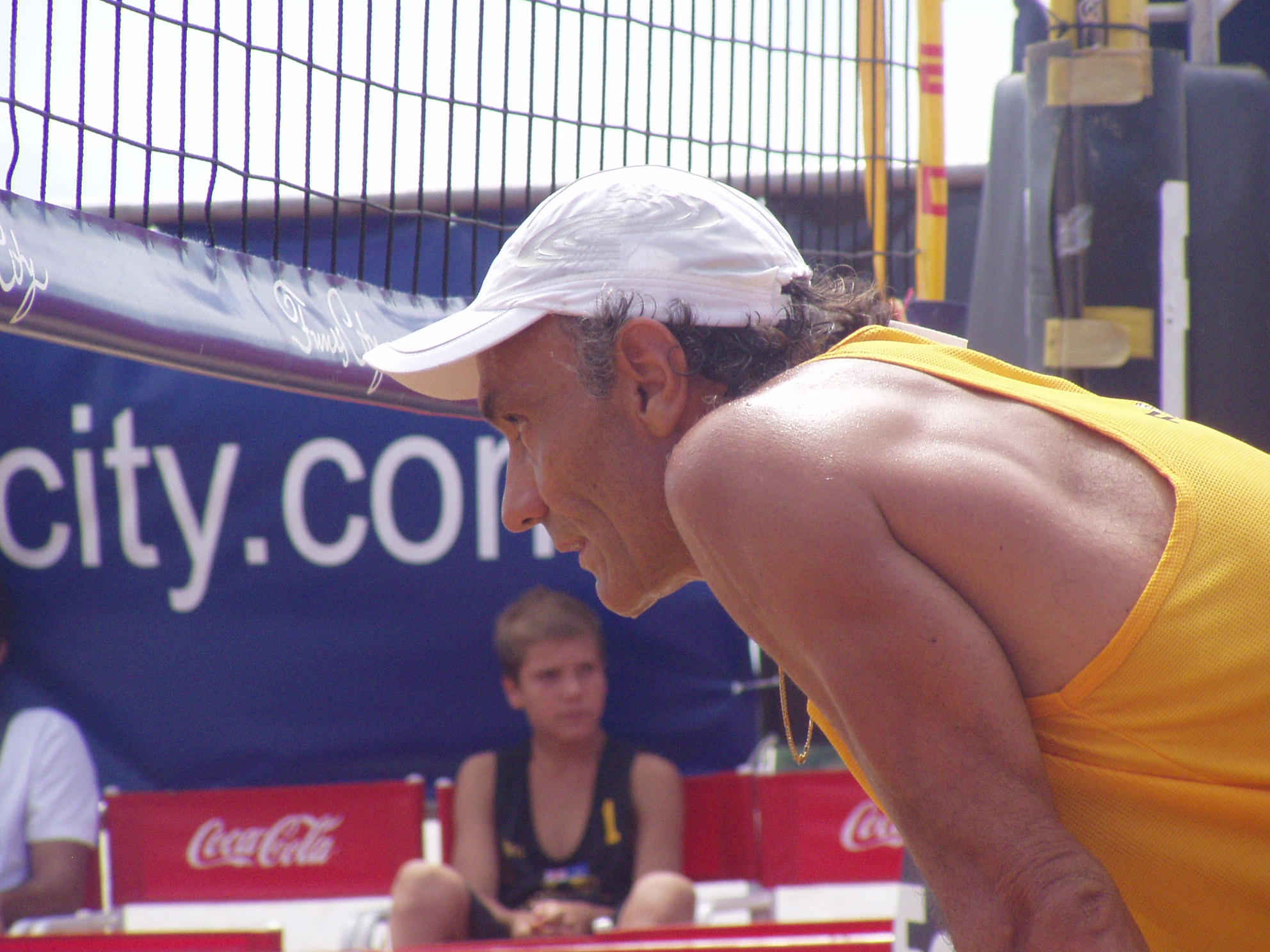 Esteban Martinez